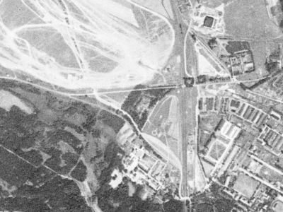 Fort VIa Twierdzy Poznań sfotografowany przez satelitę KH-4A 1023, 23 sierpnia 1965 r.